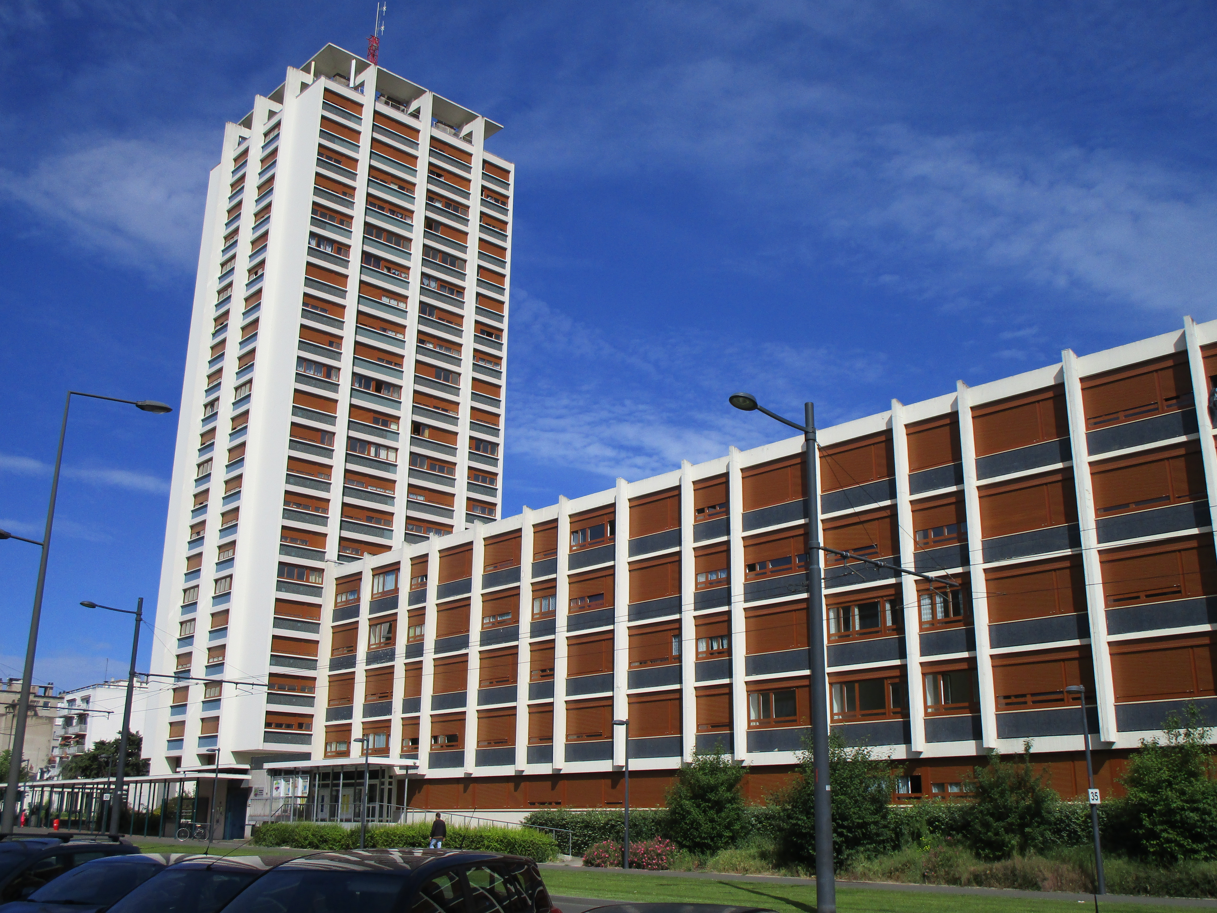 La tour U du Sanitas, vue depuis l'avenue du Général de Gaulle.